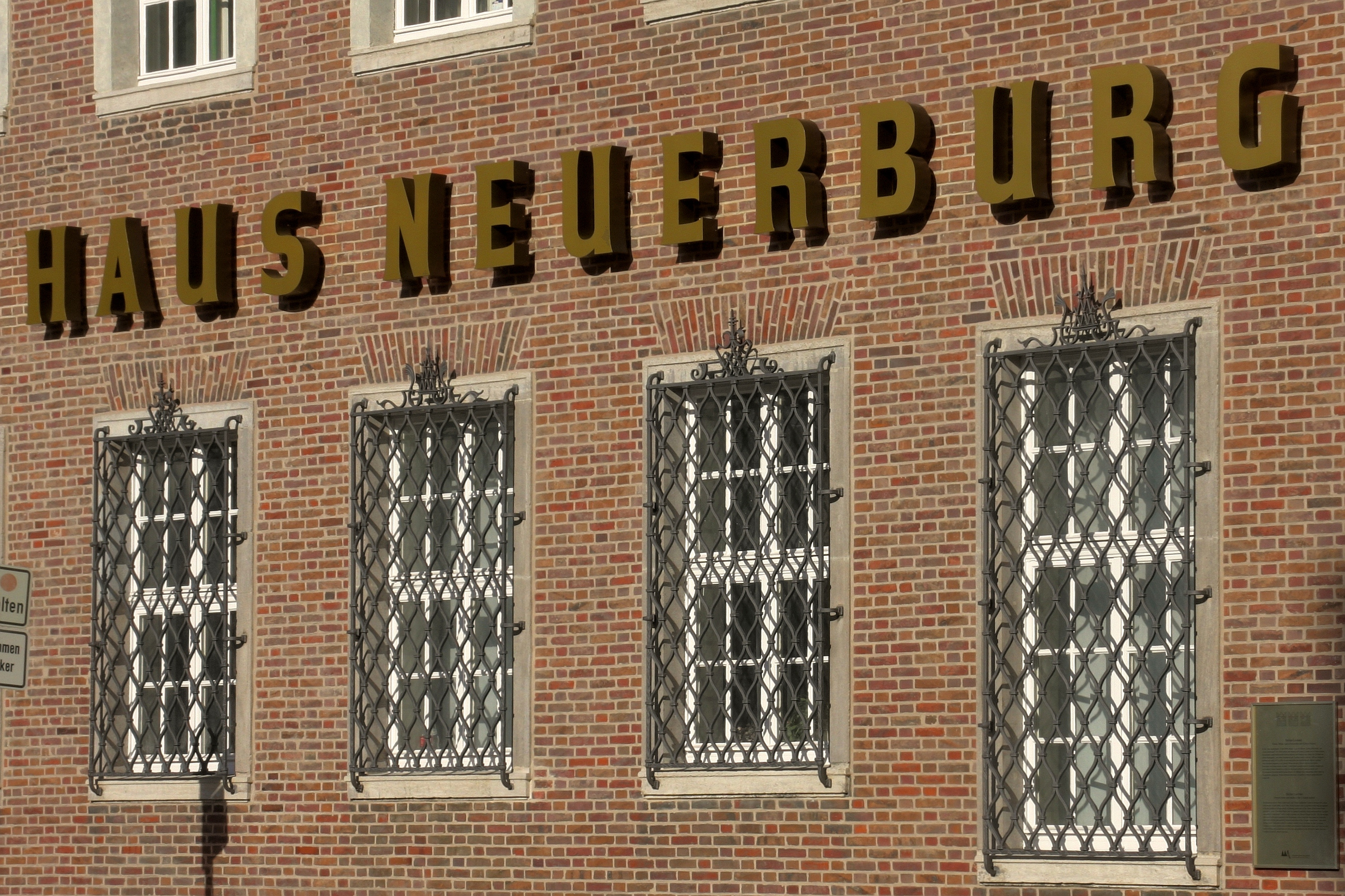 Haus Neuerburg, Ansicht vom Quatermarkt: Schriftzug. Die Fenstergitter stammen von dem Kölner Kunstschmied Carl Wyland